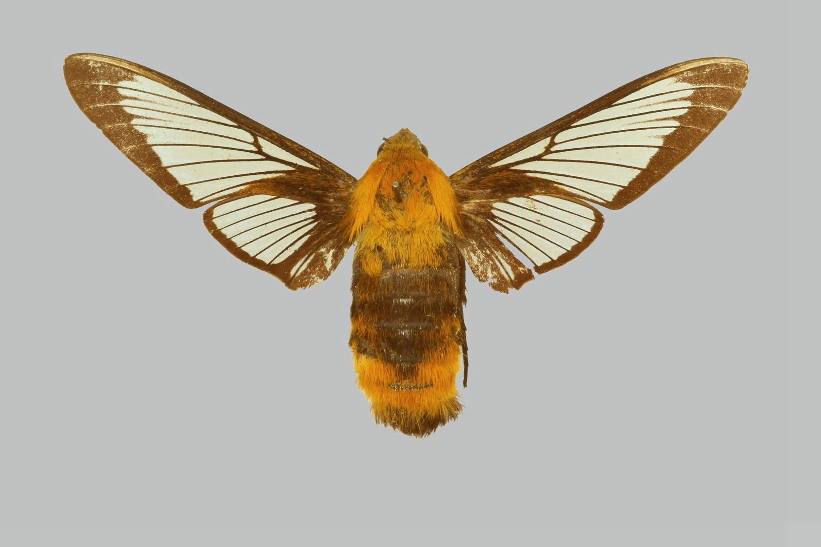 Hemaris staudingeri, female, upperside. China, Chang Yang